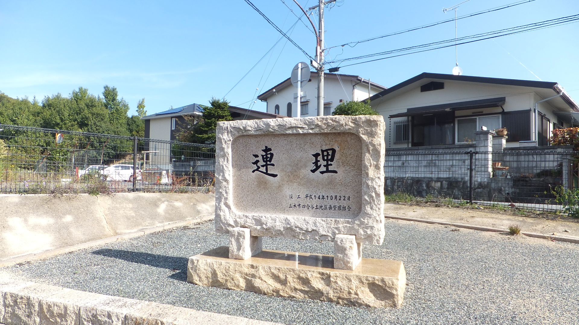 三木市四合谷土地区画整理組合 竣工記念脾